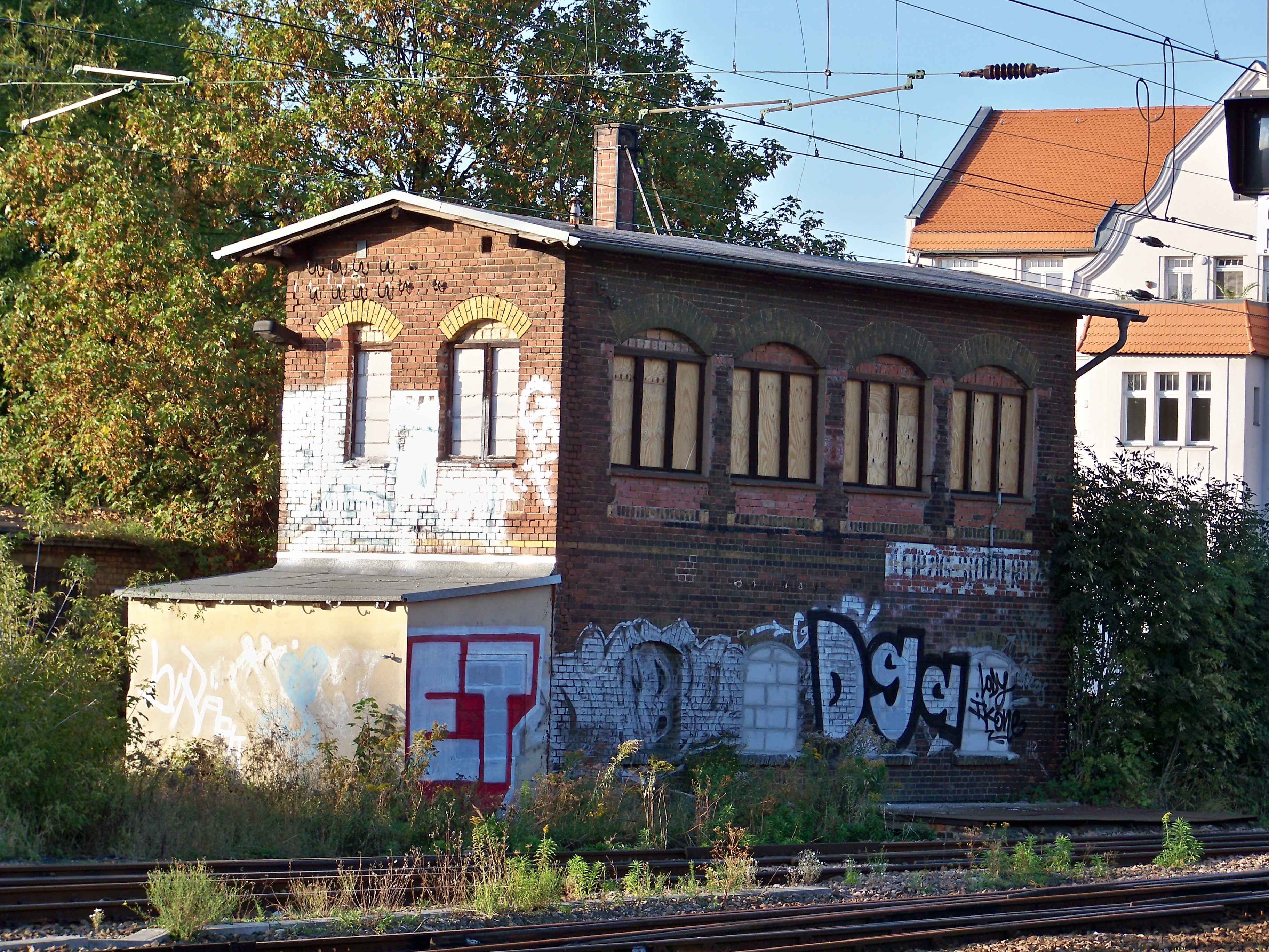 Ehemaliges Stellwerk 1 im Bahnhof Leipzig Stötteritz